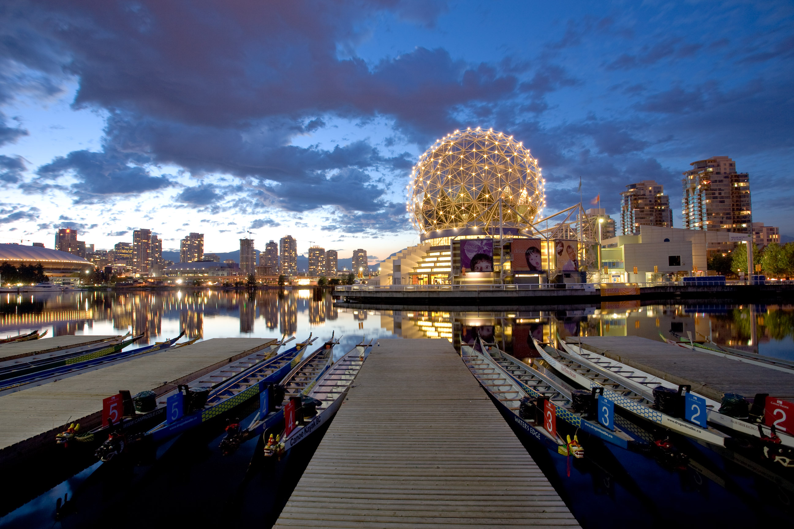 Idling between races 2008